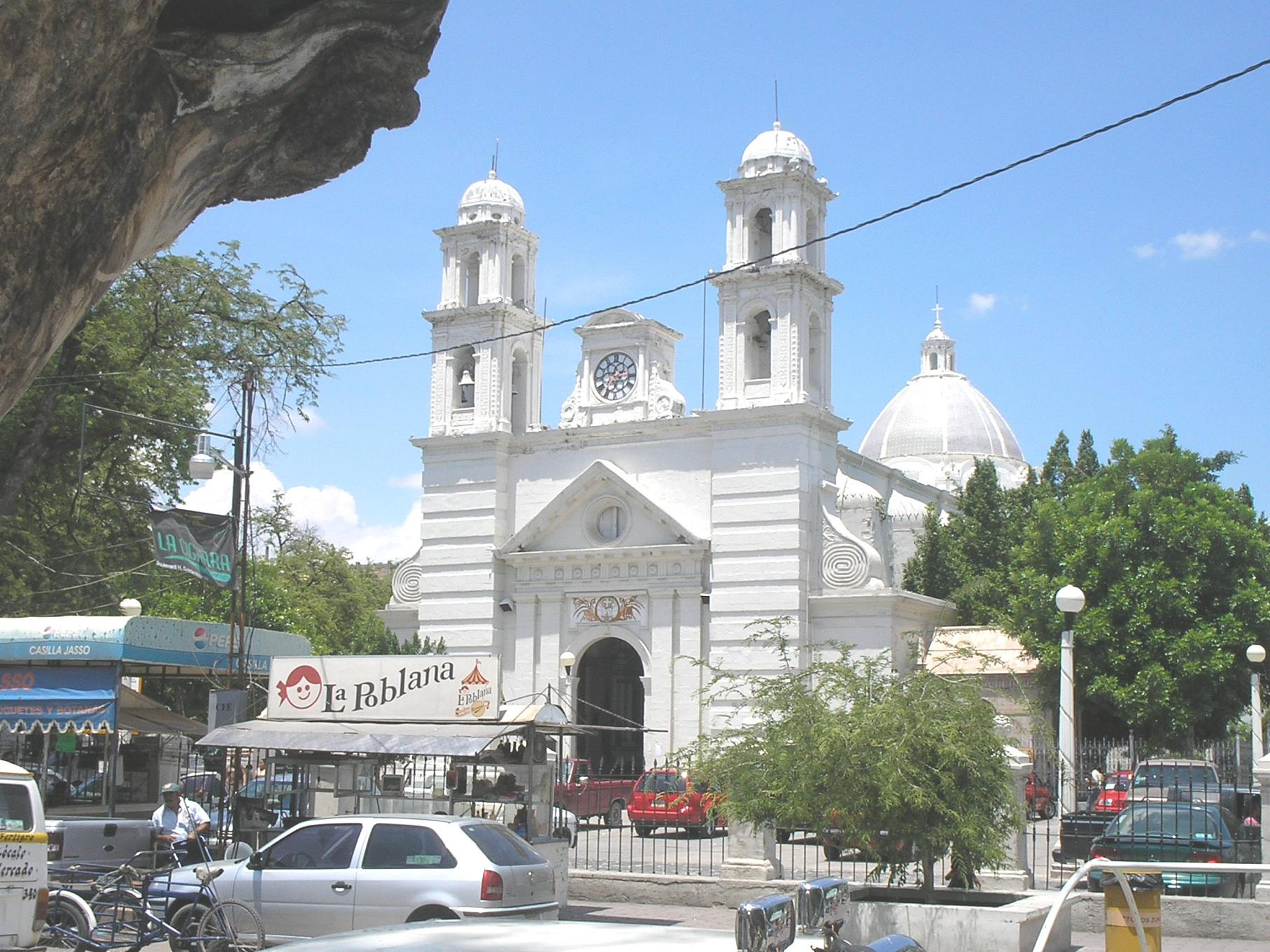 Iglesia de San Francisco en Iguala.